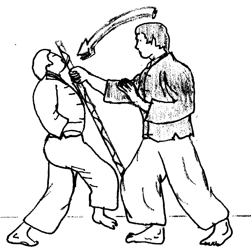 moine_baton0.jpg